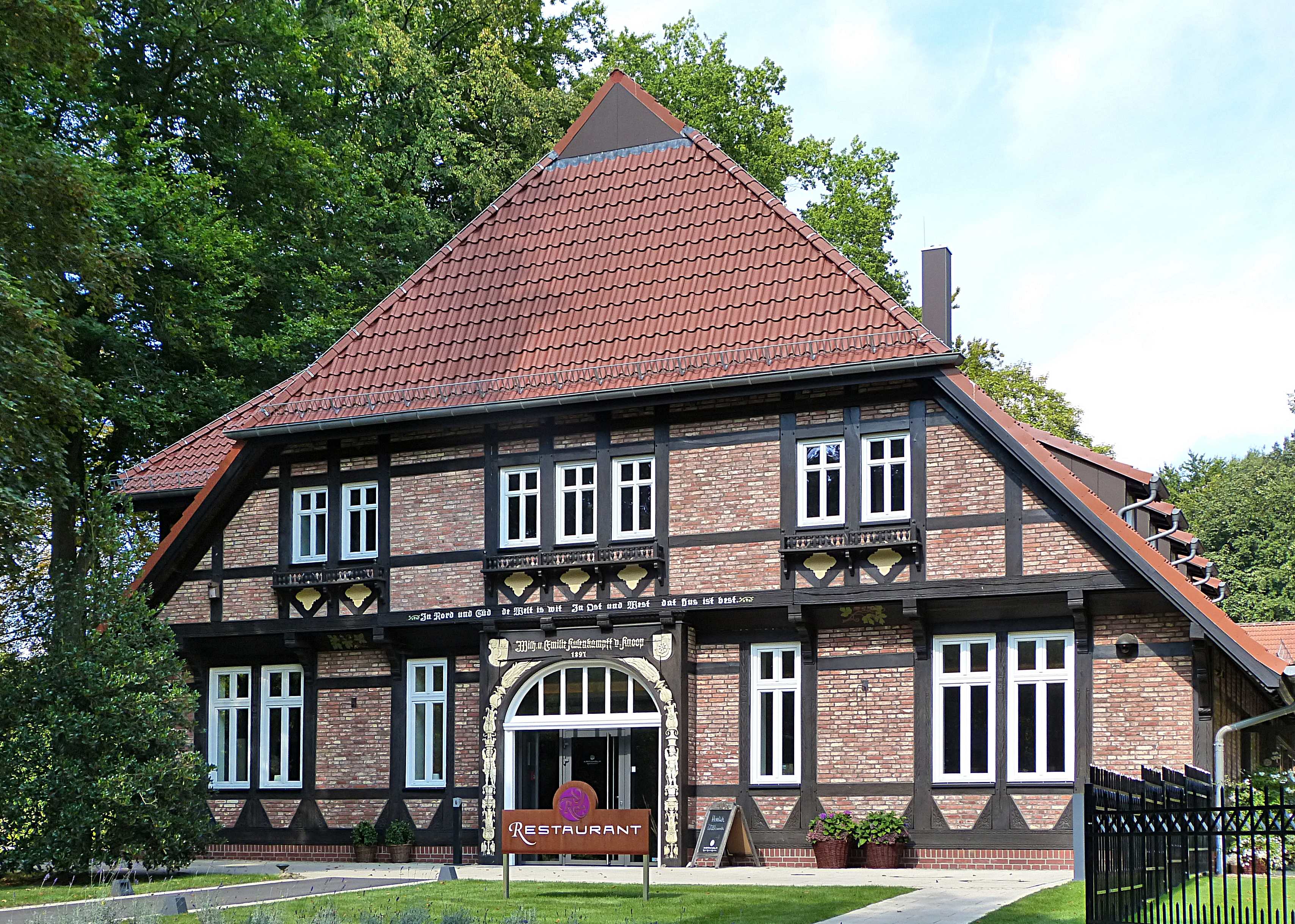 Haus Kränholm in Bremen, Auf dem Hohen Ufer 35A. Südseite, 2013-09Das abgebildete Objekt ist ein geschütztes Kulturdenkmal in der Freien Hansestadt Bremen, mit der Nr. 1883 beim Landesamt für Denkmalpflege registriert.